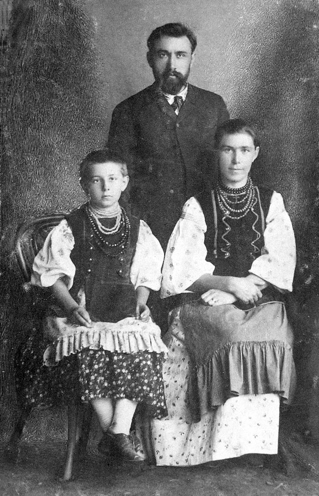 Родина Грінченків